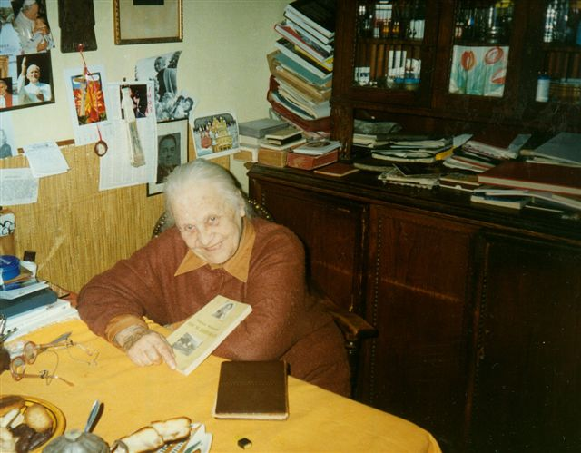 Helena Zan-Stankiewicz (1904-1996)